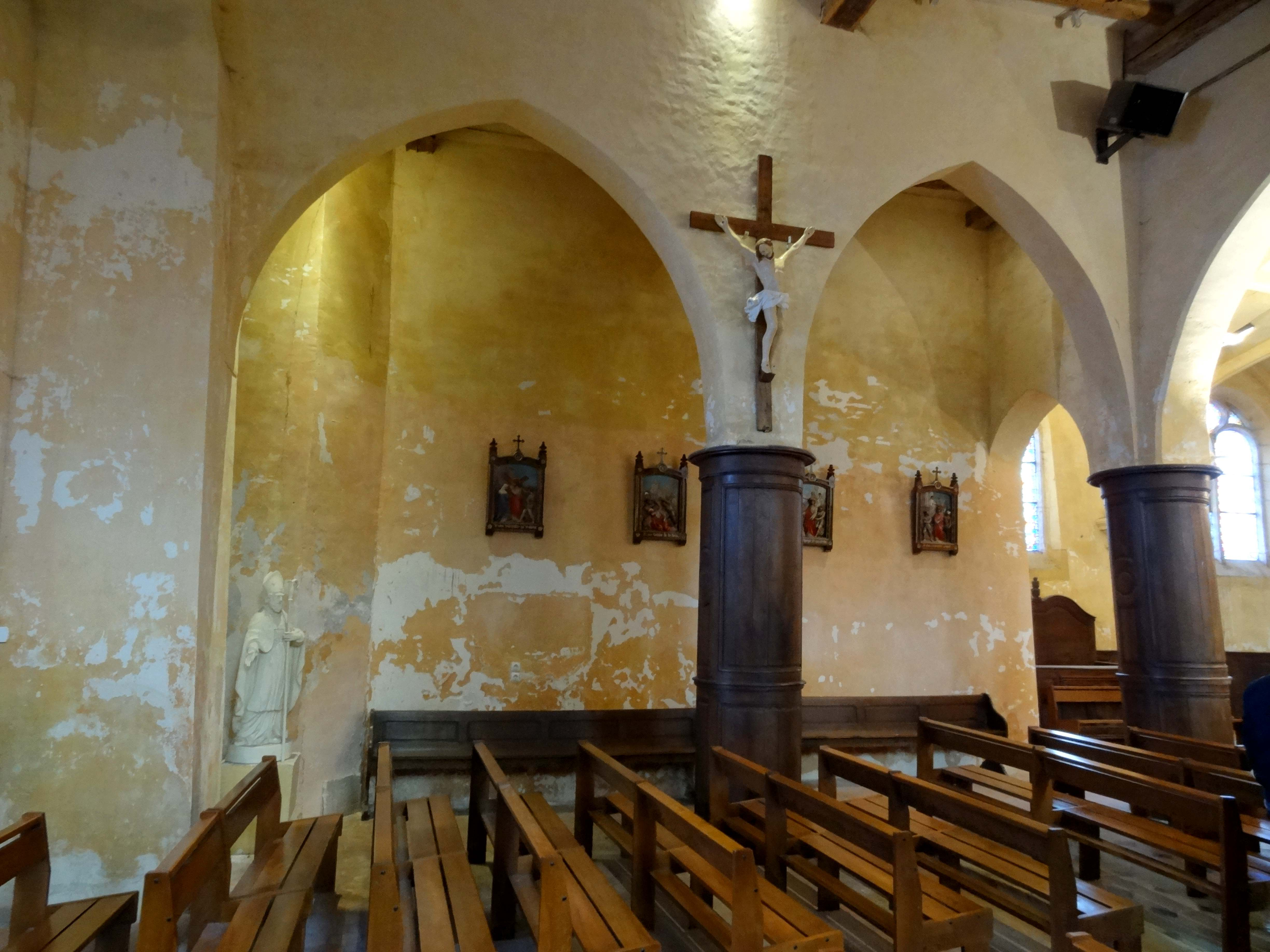 Intérieur de l'église - voir titre.